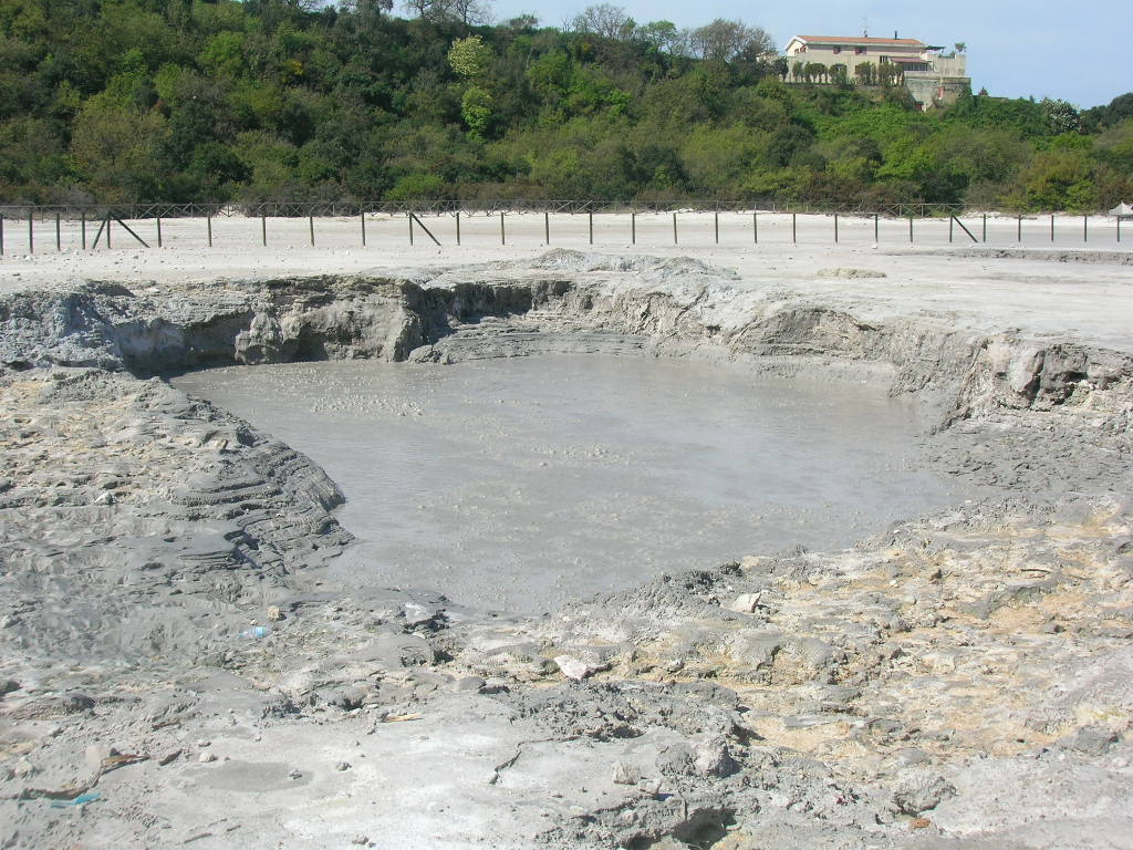 Fangaia della solfatara di Pozzuoli